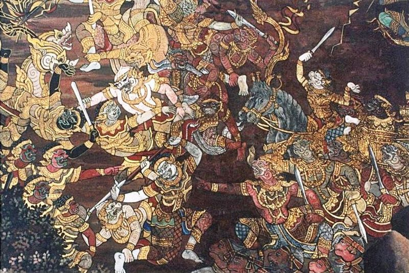 une scene du Ramayana ( Wat Phra Kaew, Bangkok)